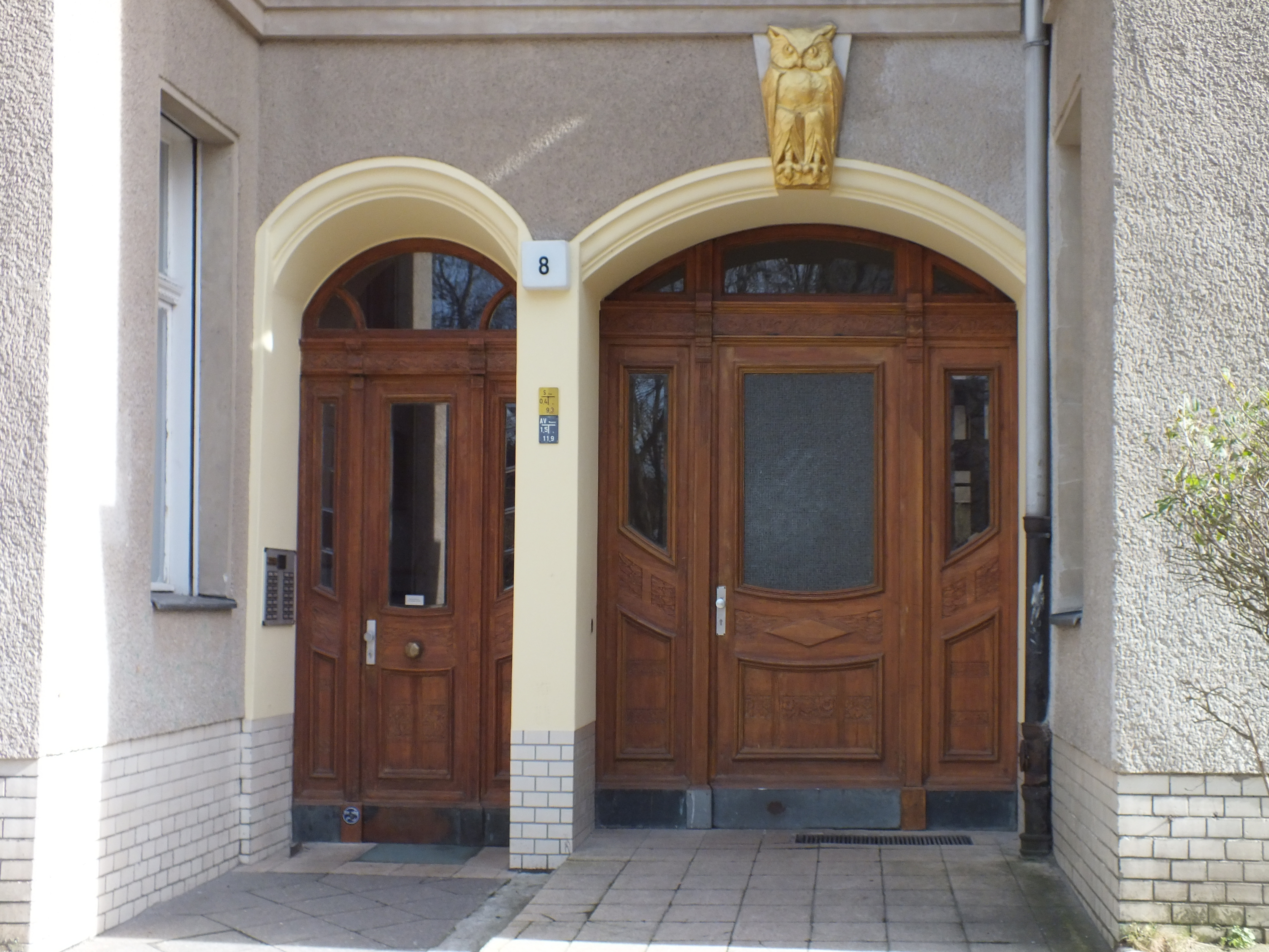 Fontanepromenade in Kreuzberg 8: Hauseingang und Durchfahrt/Durchgang zu den Hofgebäuden